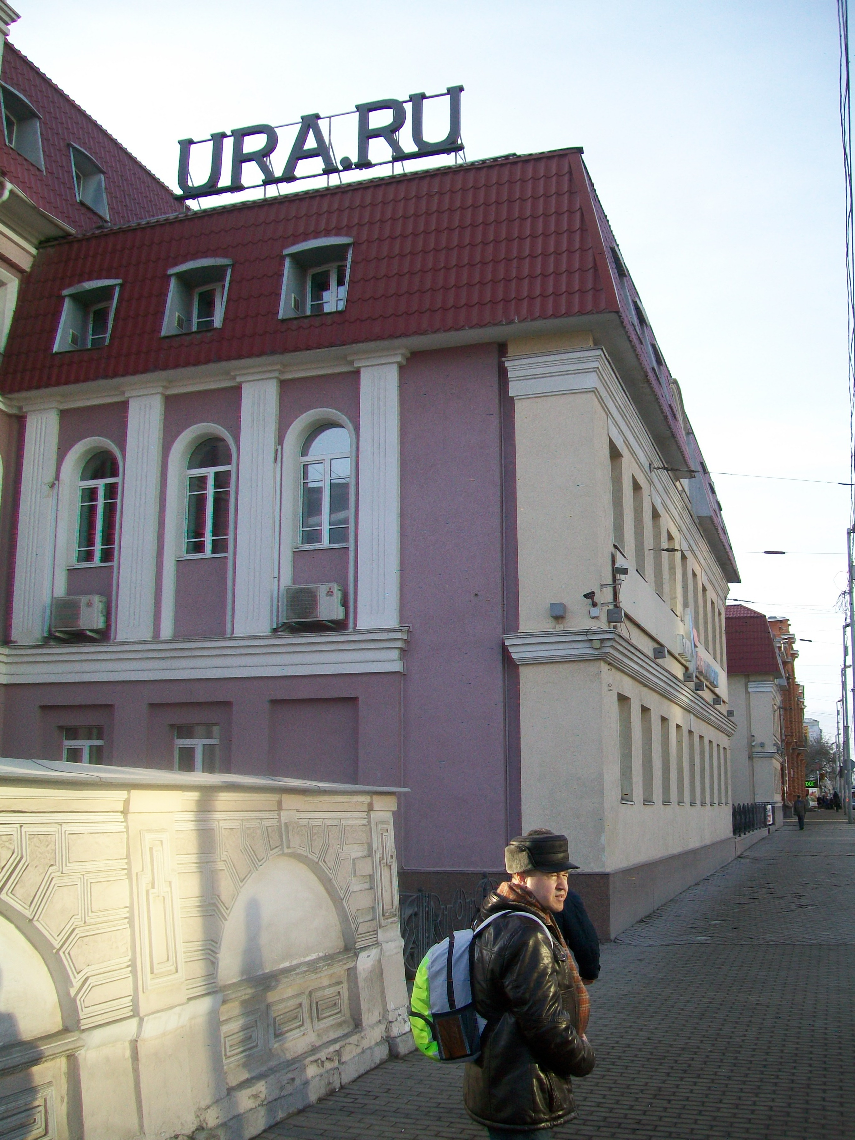 Зуфар Салихов у здания Ура.ру. Екатеринбург после Вики-Урал